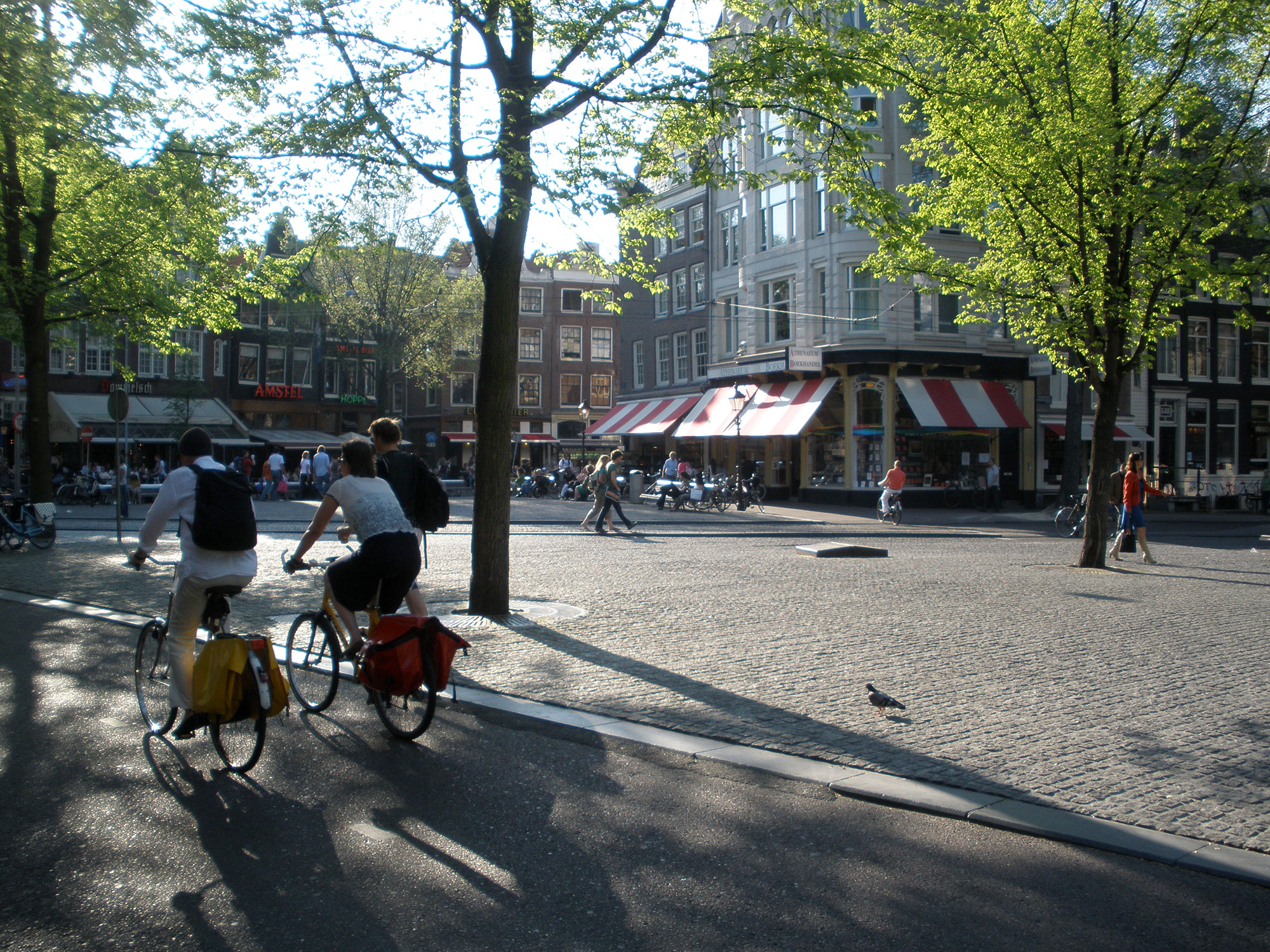 Spui square in Amsterdam